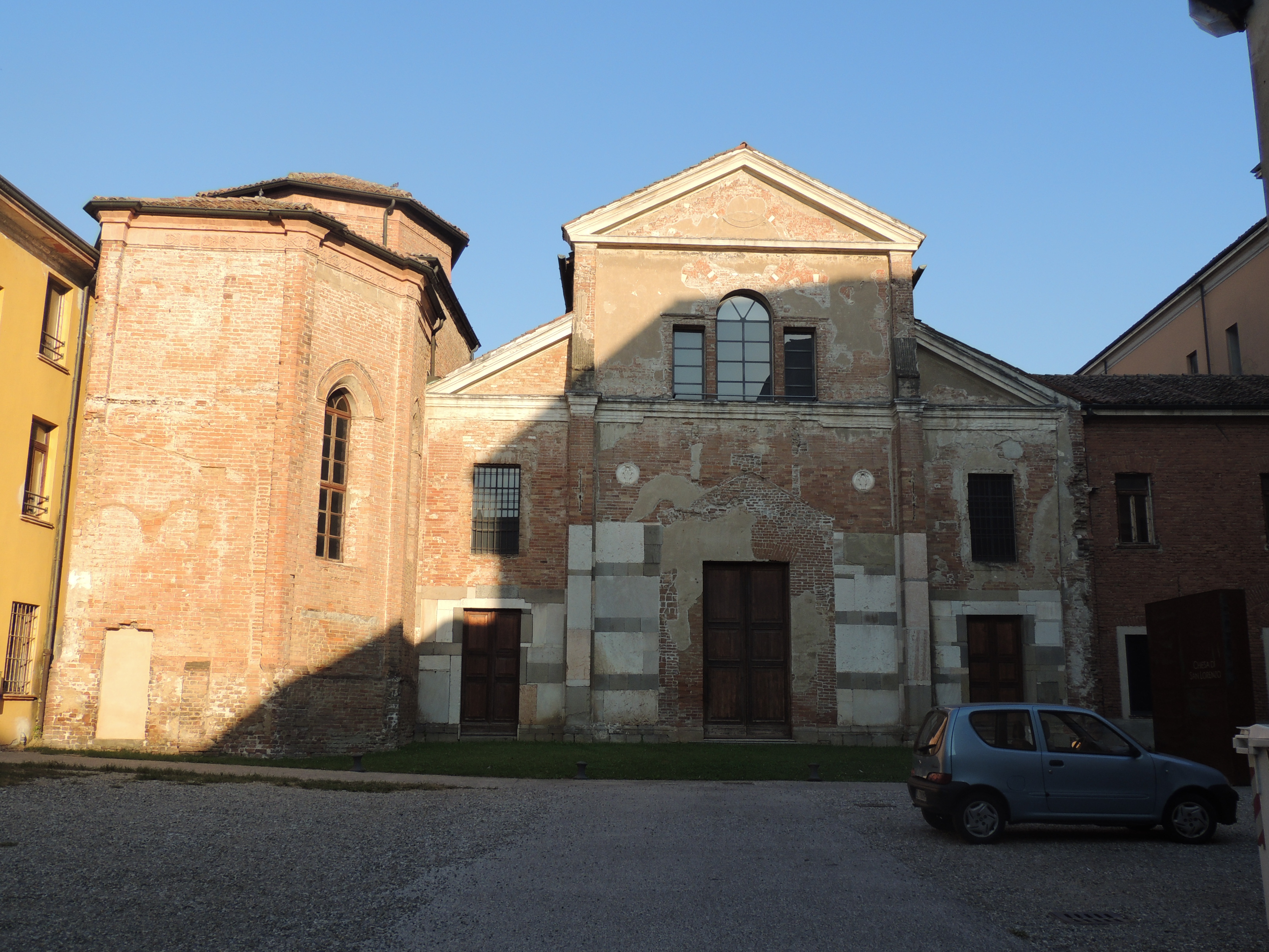 Ex basilica di San Lorenzo - Museo archeologico This is a photo of a monument which is part of cultural heritage of Italy.